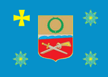 Прапор Кобеляцького району